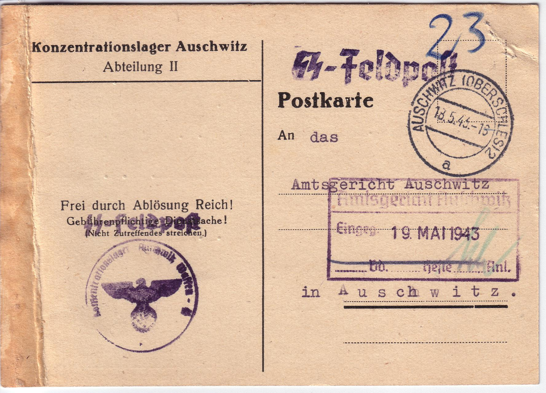 SS-Feldpostkarte aus dem KZ Auschwitz in Oberschlesien vom 18.05.1943. Dienstsiegel: "Konzentrationslager Auschwitz Waffen-SS" Eingangsstempel "Amtsgericht Auschwitz"